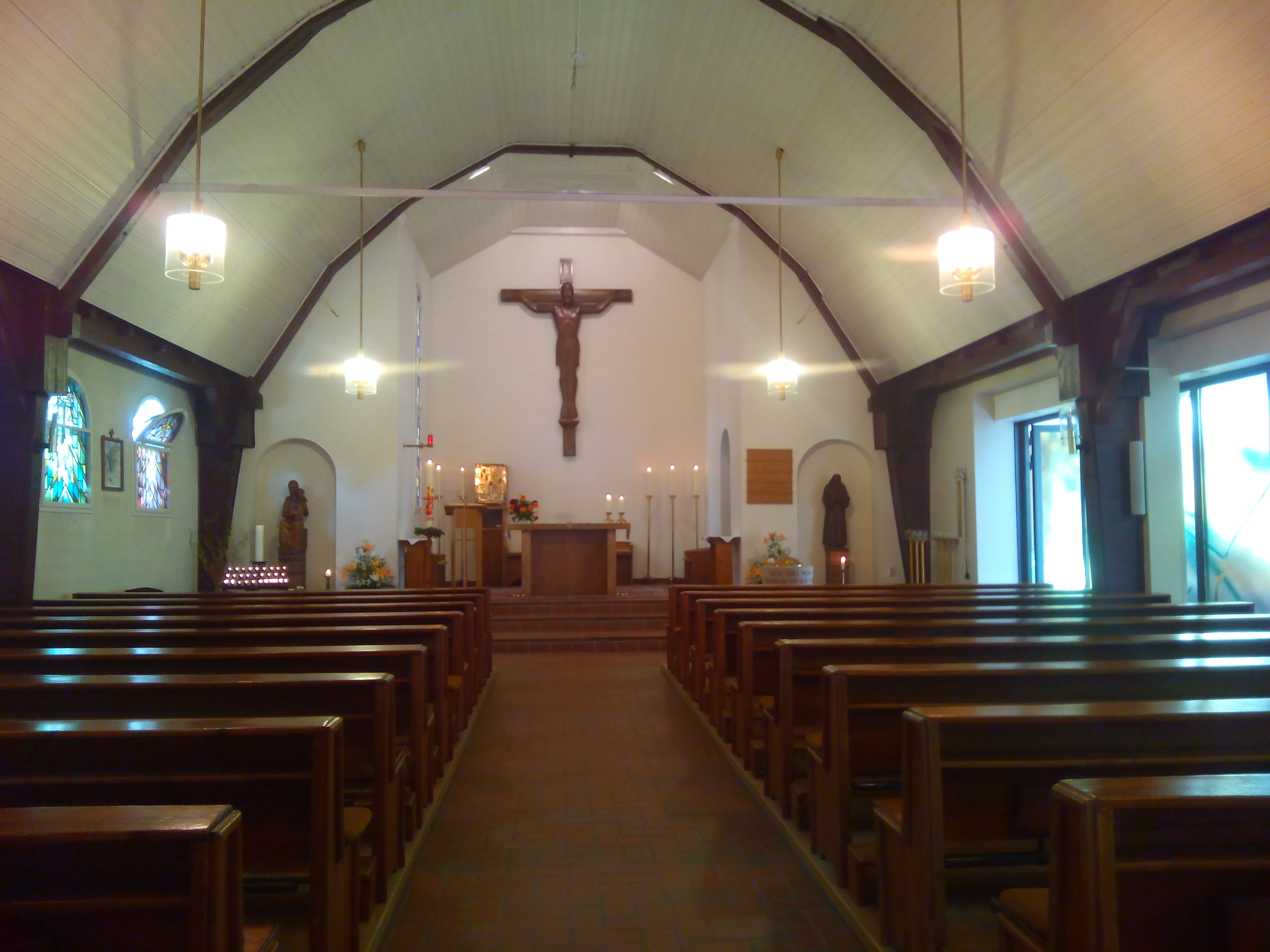 Innenaufnahme der Kirche St. Konrad von Parzham in Falkensee